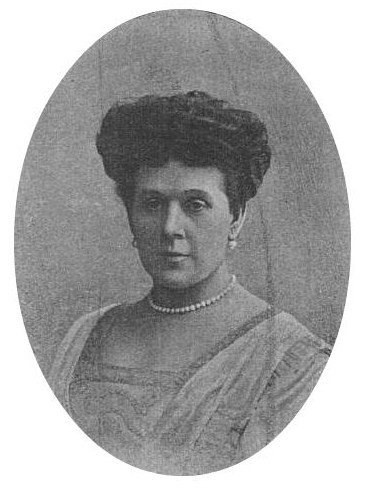 Александра Владимировна Базилевская, ур. Переслени